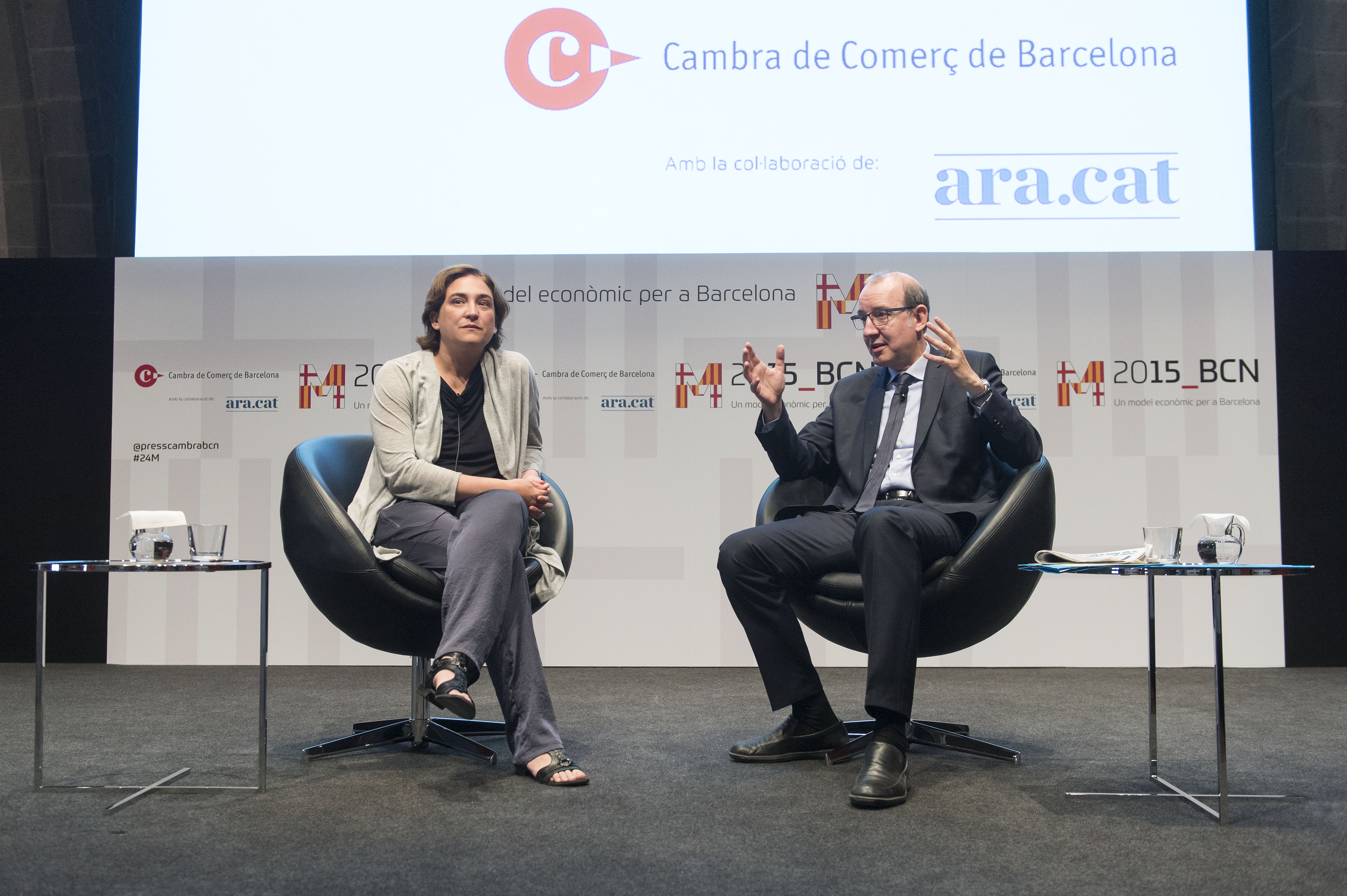 La Cambra de Comerç de Barcelona, conjuntament amb el diari ARA, han organitzat esmorzars-entrevista amb els candidats a les eleccions municipals del 24 de maig. En aquesta ocasió, Antoni Bassas, director audiovisual del diari ARA, entrevista Ada Colau, candidata de BCN en Comú